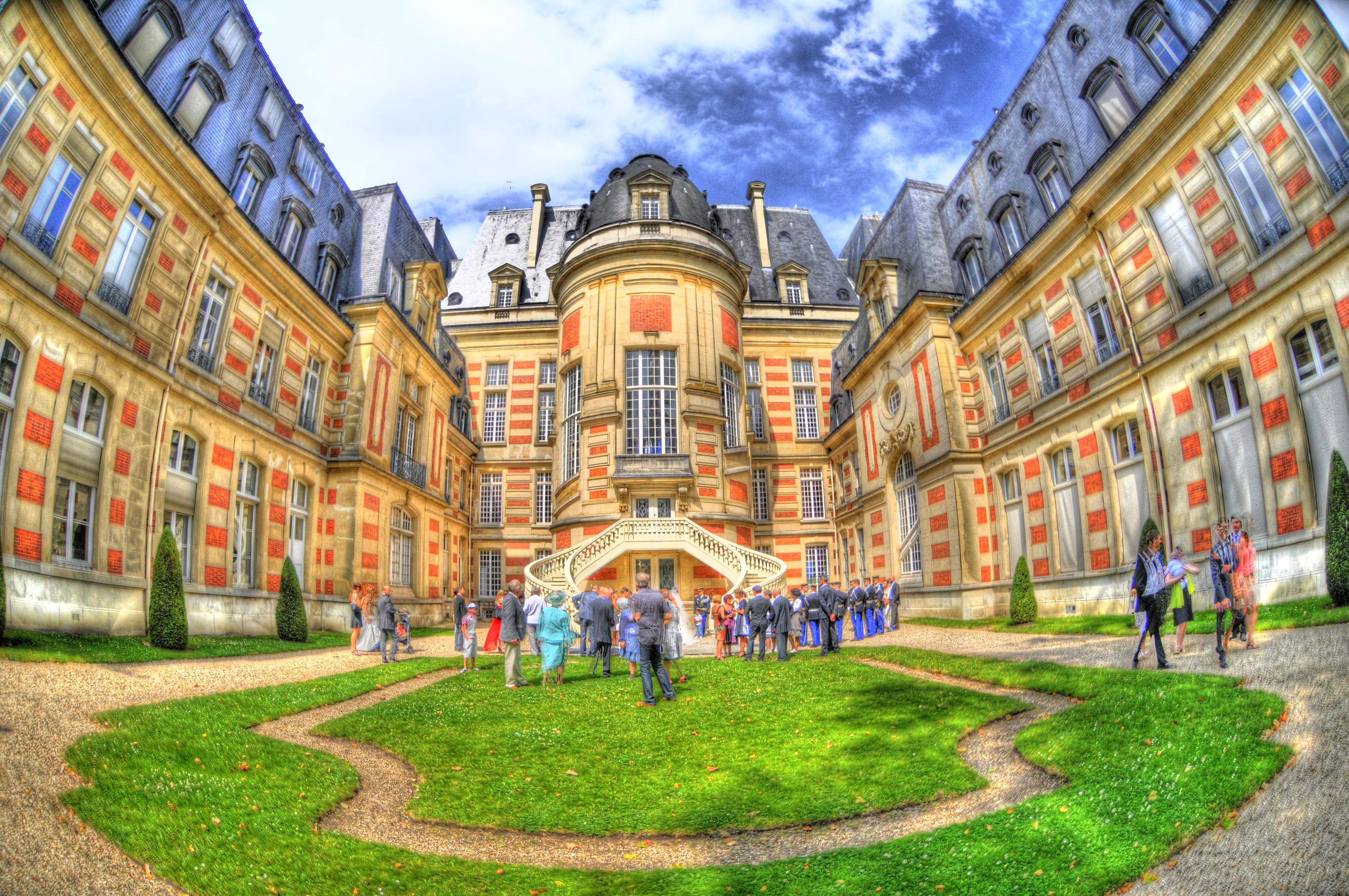 Photo de la Mairie de Versailles (vue de derrière)